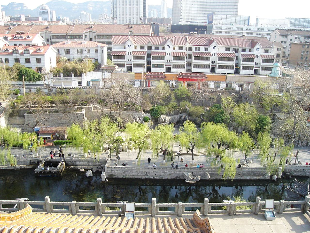 自济南解放阁俯瞰南护城河，左侧方形泉池为玛瑙泉。